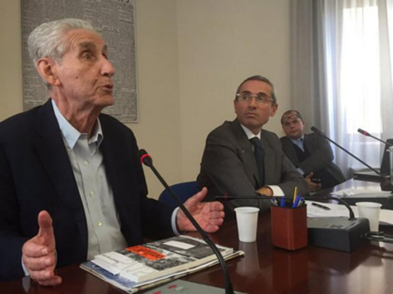 Roma 3 novembre 2015 - conferenza stampa alla Fnsi per petizione “No bavaglio” promossa da Stefano Rodotà, Marino Bisso, Arturo Di Corinto e Giovanni Maria Riccio. Nella foto Stefano Rodotà, Raffaele Lorusso, Marino Bisso